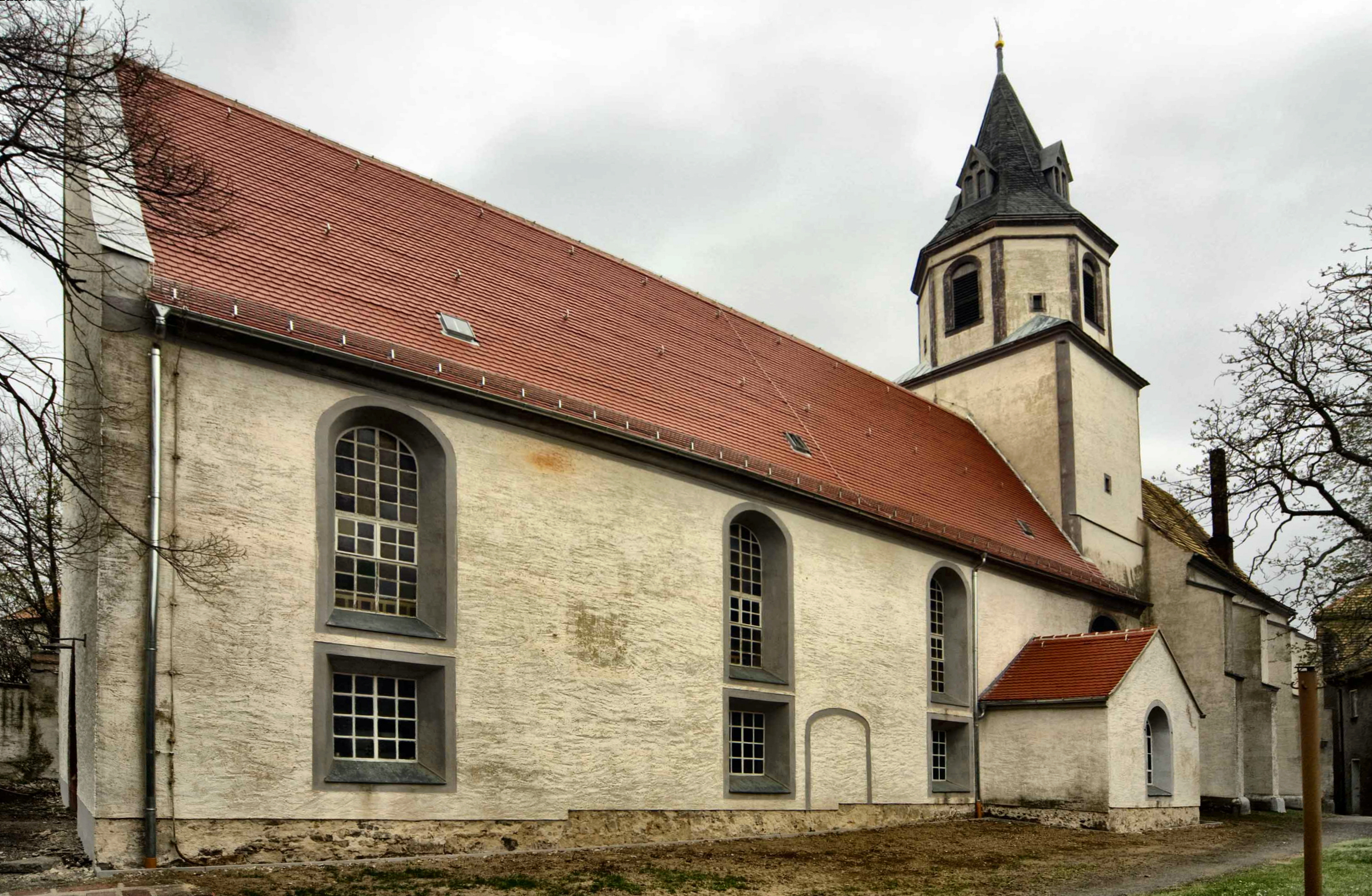 Kirche des ehemaligen Servitenkloster in Mutzschen in Sachsen